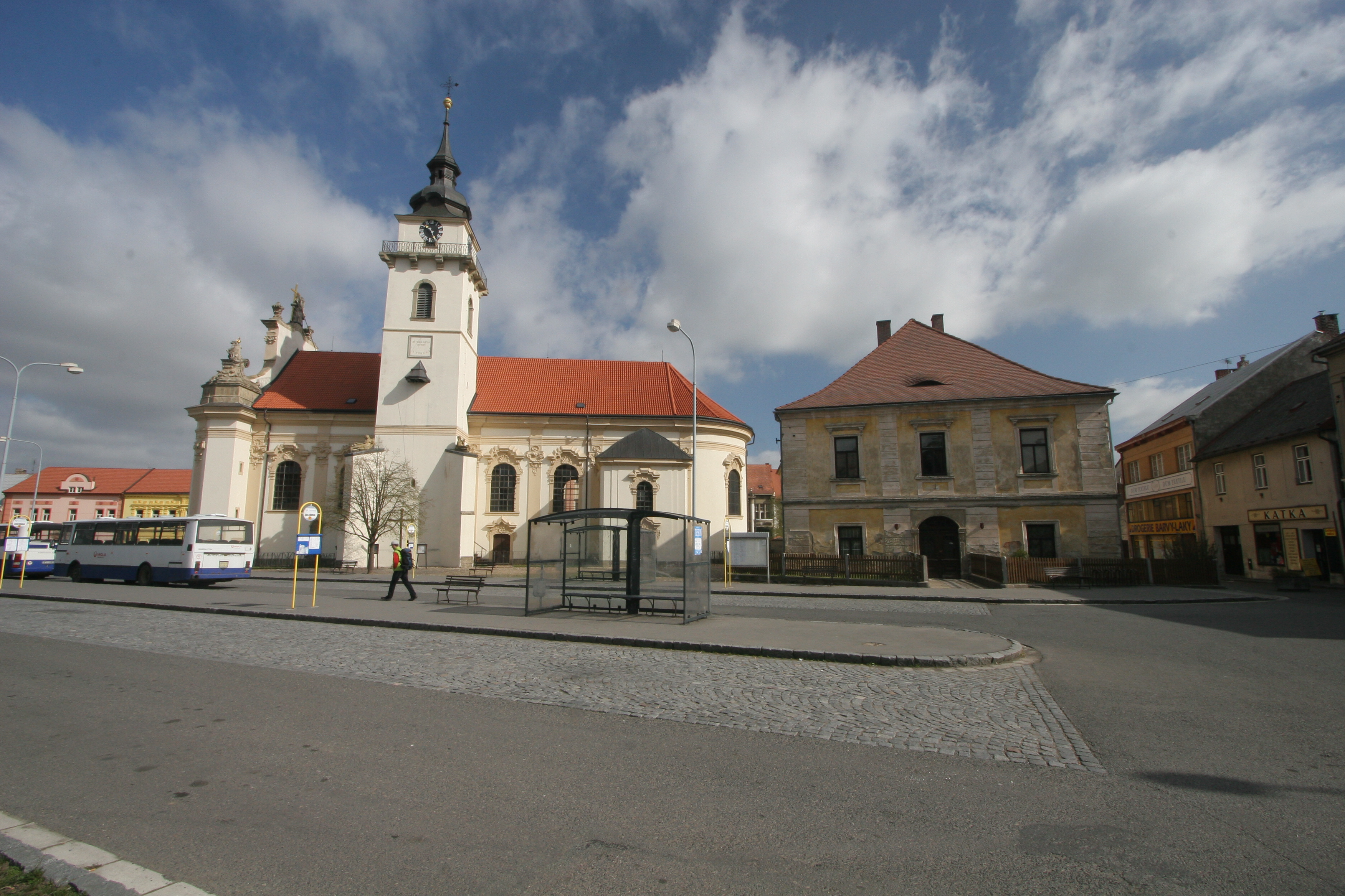 Kostel sv. Bartoloměje v Heřmanově Městci